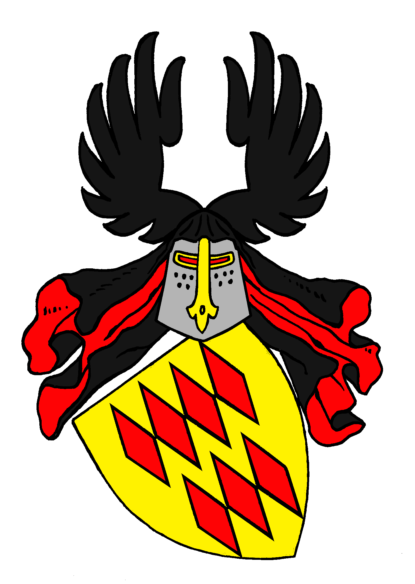 Stammwappen der Grafen von Virneburg (mit früher Variante der Helmzier), ein Adelsgeschlecht, das im Mittelalter zu den einflussreichen Familien im Rheinland gehörte. Sie hatten ihren Stammsitz auf Burg Virneburg. Ihr Territorium war die Grafschaft Virneburg, die im heutigen linksrheinischen nördlichen Rheinland-Pfalz lag. Mit Heinrich II. von Köln und Heinrich III. von Mainz stellten die Virneburger im 14. Jahrhundert zwei Erzbischöfe. Der Vater des ersten Grafen von Virneburg, Hermann, war wahrscheinlich Bernard von Virneburg, der von 1042 bis 1061 in Urkunden der Erzbischöfe von Trier als Zeuge aufgeführt wurde. Das Geschlecht der Grafen von Virneburg erlosch mit Ruprecht IV. im Jahre 1445 und wurde hauptsächlich von den Grafen von Manderscheid beerbt, von welchen die Grafschaft Virneburg zu Ende des 16. Jahrhunderts durch Heirat an die Fürsten von Löwenstein-Wertheim kam.